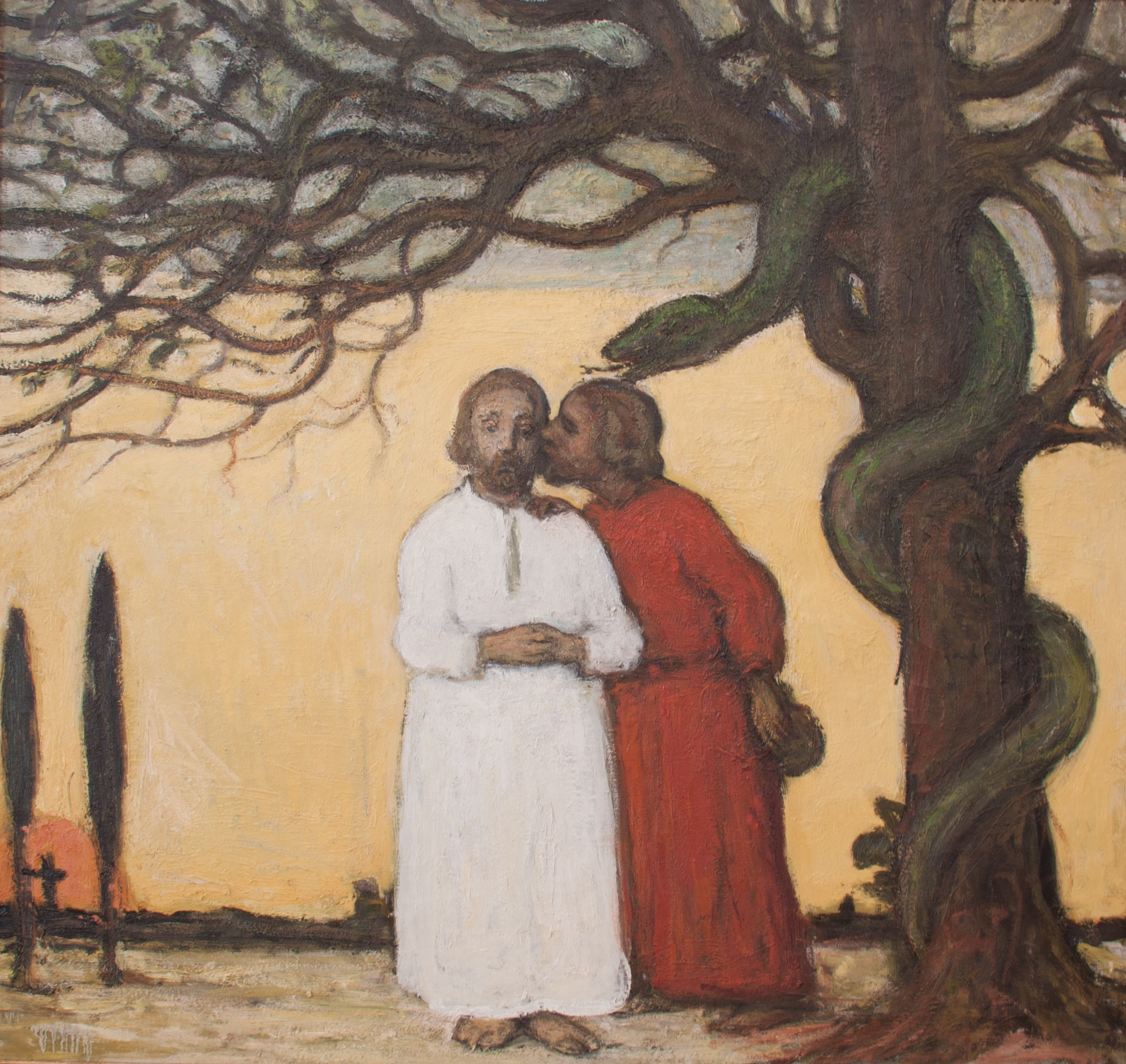 schilderij ( Jakob Smits ( Jakob Smits Museum (